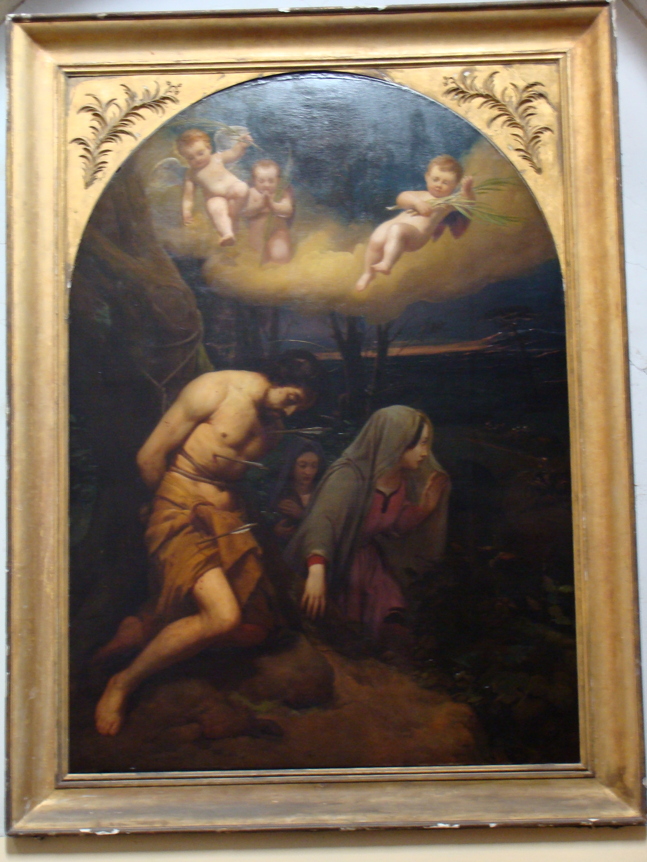 Le martyre de Saint-Sébastien -1832- Féron Baslique Notre-Dame de Boulogne-sur-Mer